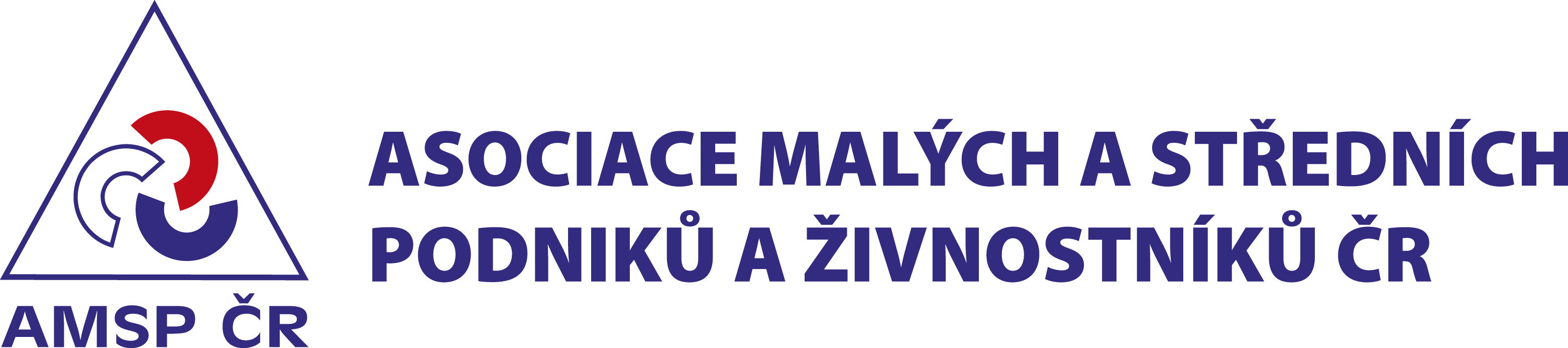 logo AMSP ČR s popiskou